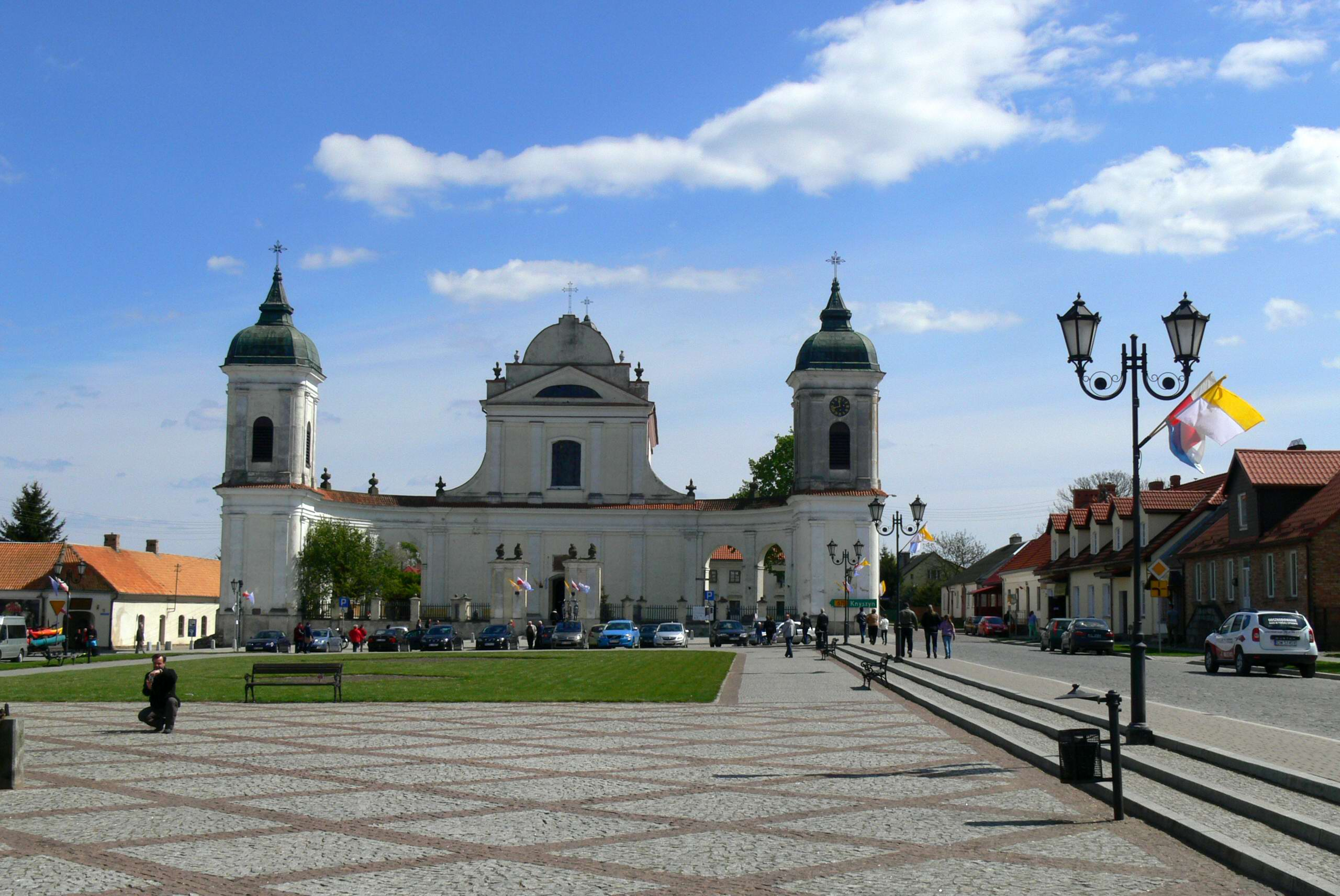 Tykocin, kościół, ob. par. p.w. Św. Trójcy, 1742-1745